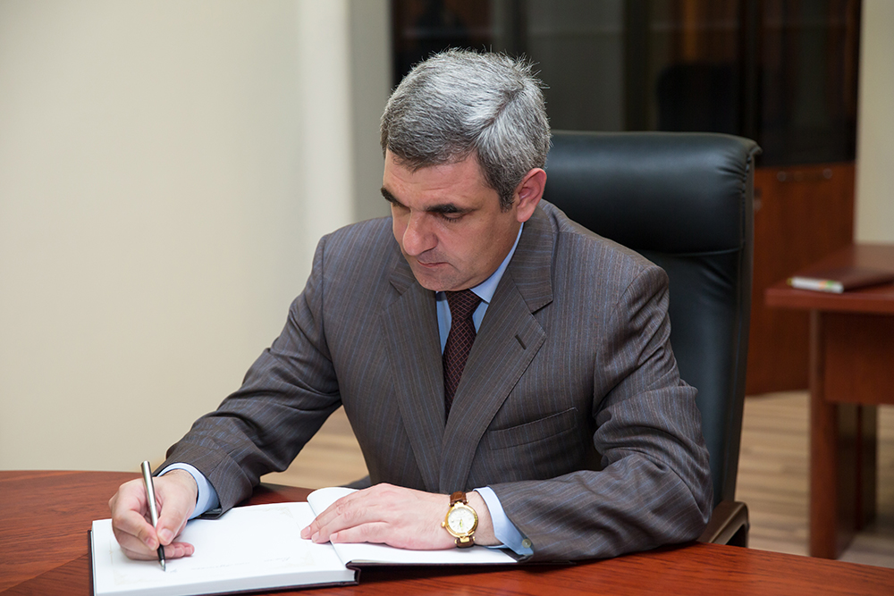 Михаил Валерьевич Логуа - 4-й Вице-президент Республики Абхазия